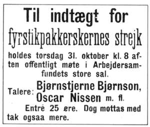 Kunngjøring ifb. med Fyrstikkarbeiderstreiken i Kristiania i 1889